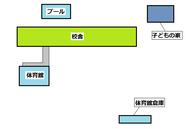 宇都宮市立豊郷北小学校の施設配置簡略図です。